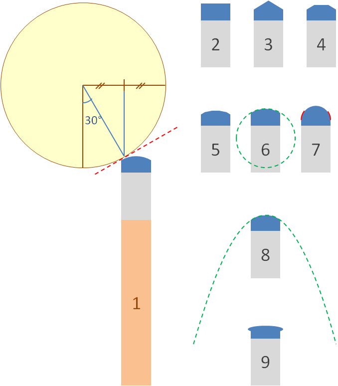 different tip shapings for billard cues